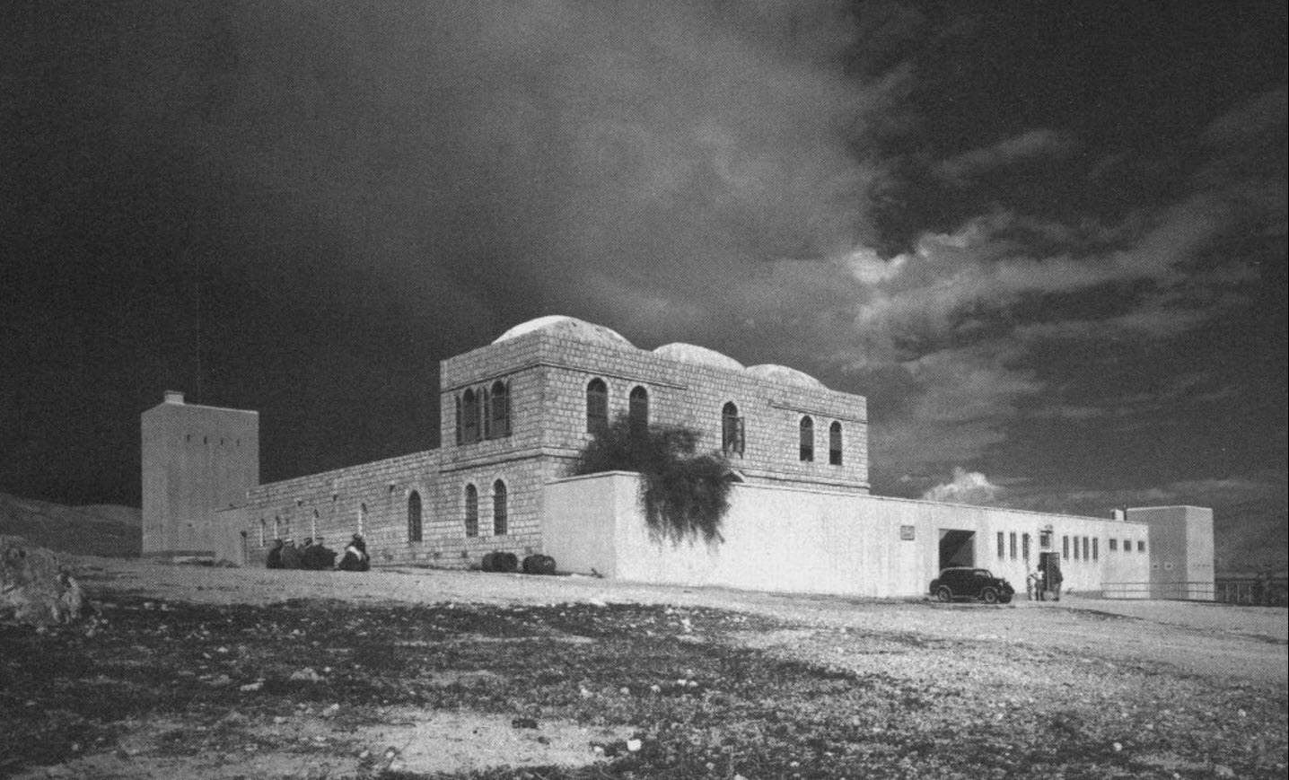 משטרת הג'יפתליק